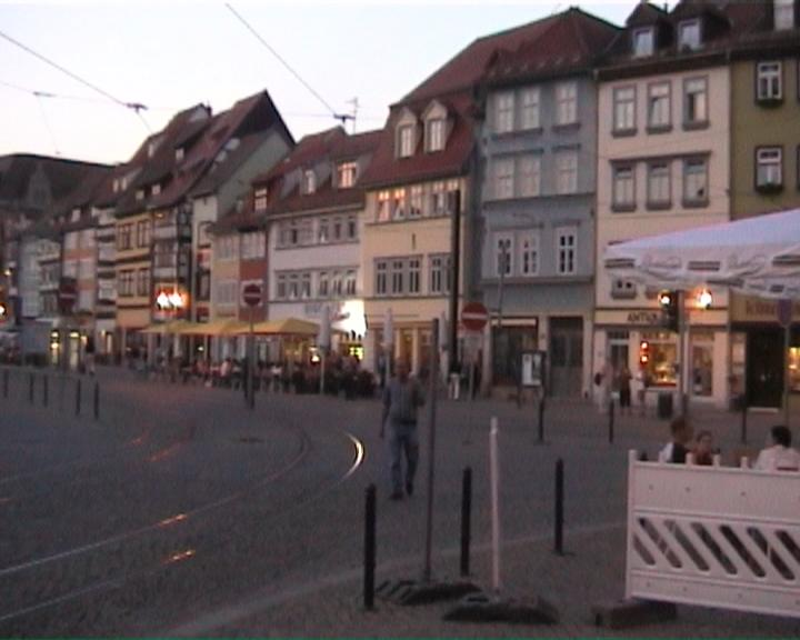 Blick in die Erfurter Innenstadt am Abend - Domplatz